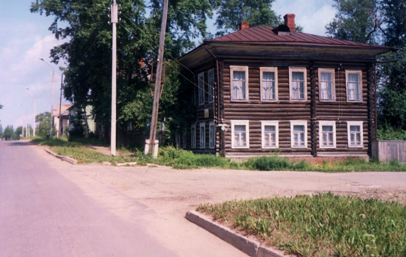 Дом, в котором жил художник-пейзажист Вахрушев Ф.М.: улица Ворошилова, 20, Тотьма, Тотемский район, Вологодская область